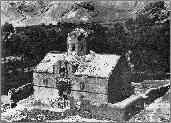 Ագուլիսի սբ.Ստեփանոս եկեղեցի St. Stepanos church, Agulis